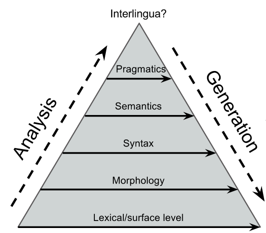 Mida kõrgemal tasemel toimub ülekanne, seda keelteülesem on masintõlke süsteem. Eeldusel, et sisendi analüüs kõrgemale tasemele on korrektne, paraneb nii ka tõlke kvaliteet.